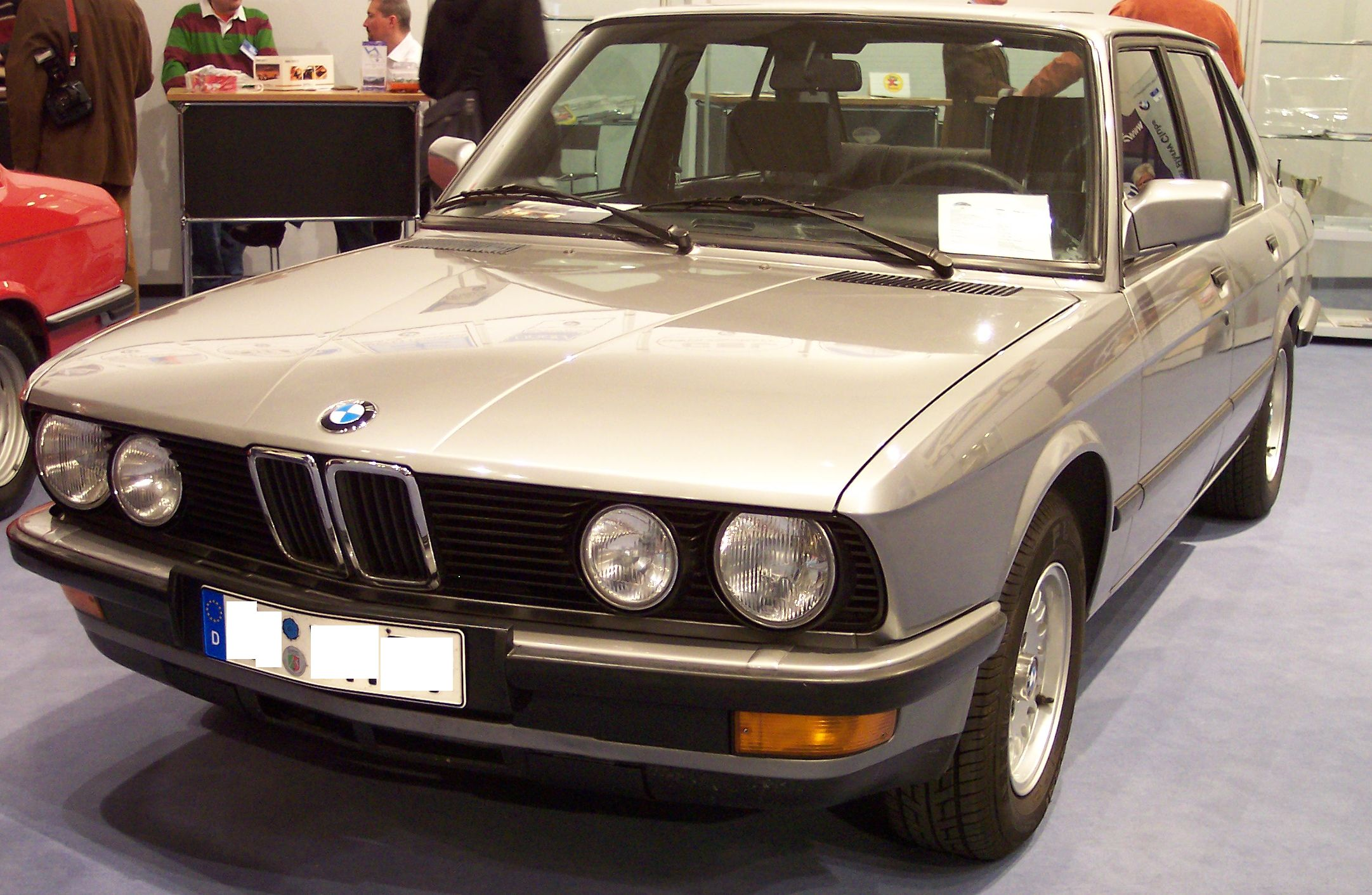 BMW 5er